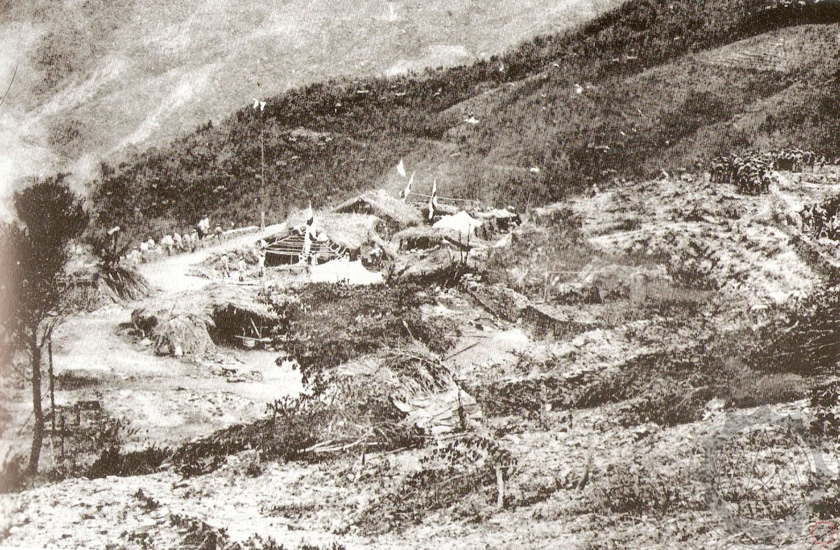 日本軍隊佔領波阿倫社後之景。